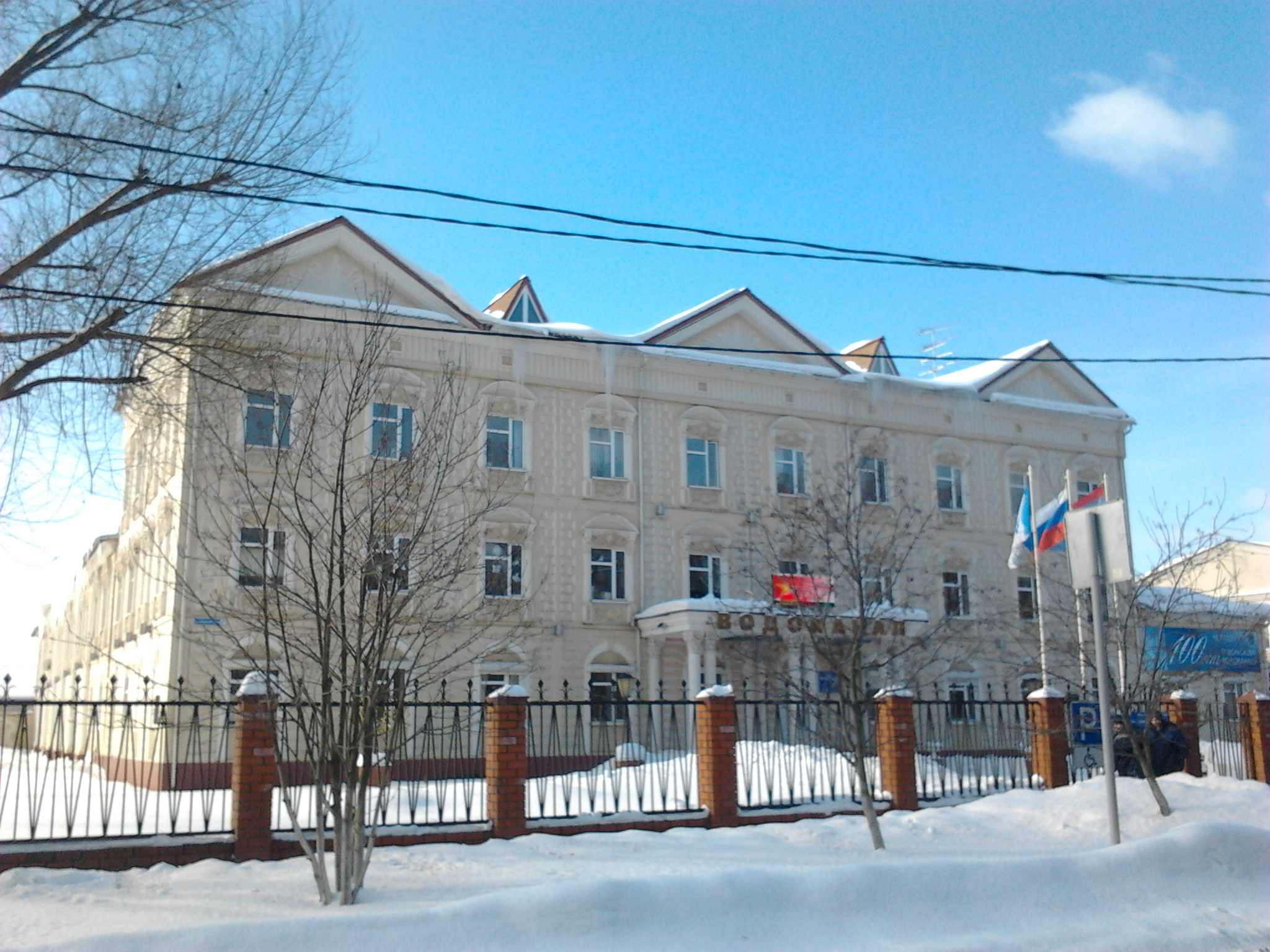 Главное здание МУП «Водоканал»